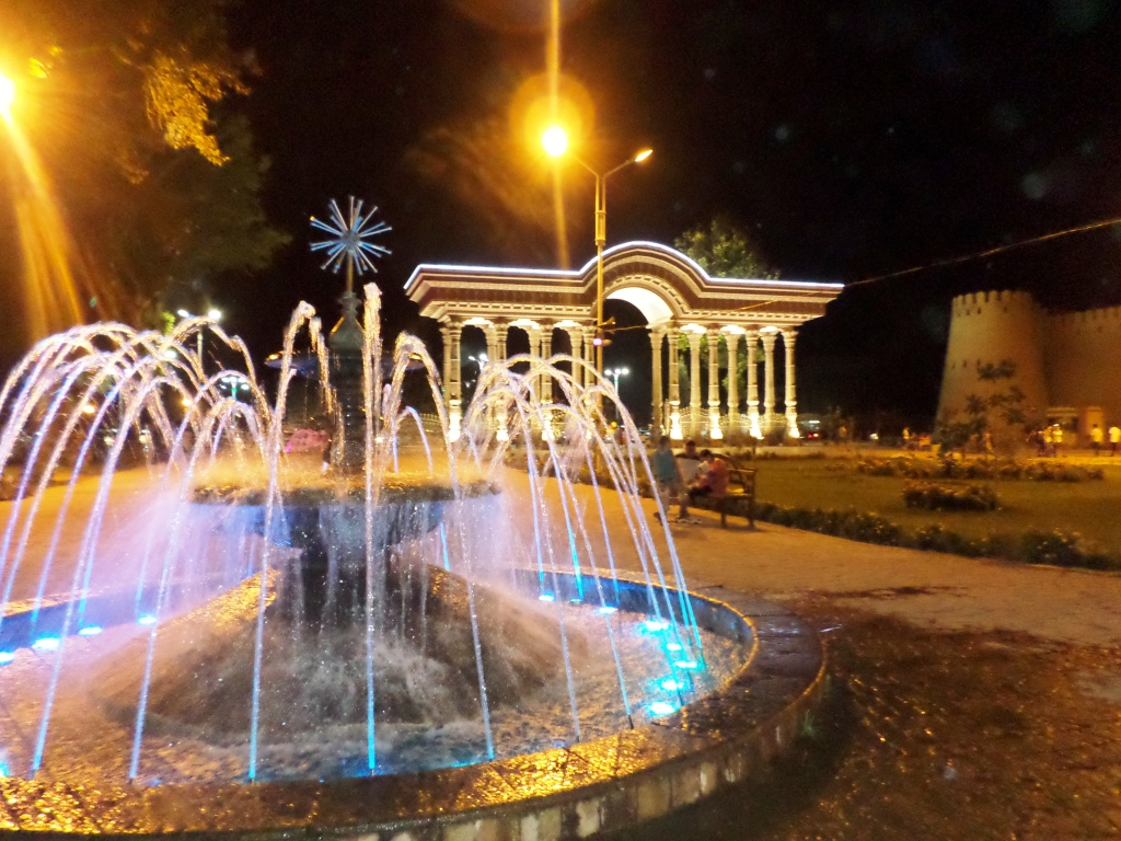 Фонтаны города Худжанда в Таджикистане Тоҷикӣ: Фавораи назди боғ, ш. Хуҷанд